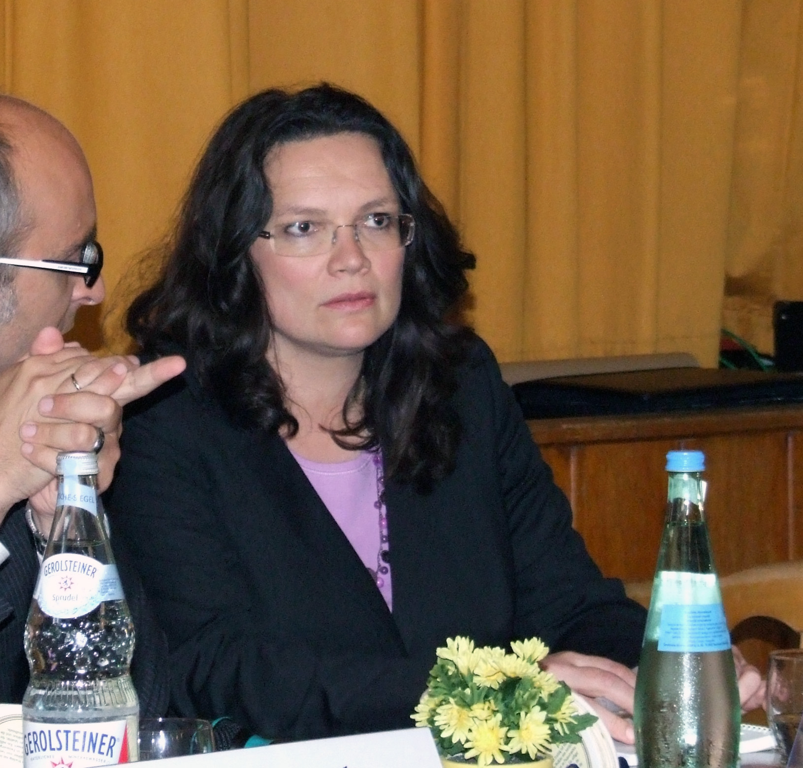 Andrea Nahles, Generalsekretärin der SPD, im 27. Mai 2010, Naturfreundehaus Speyer bei einer Arbeitnehmerkonferenz der AfA Speyer